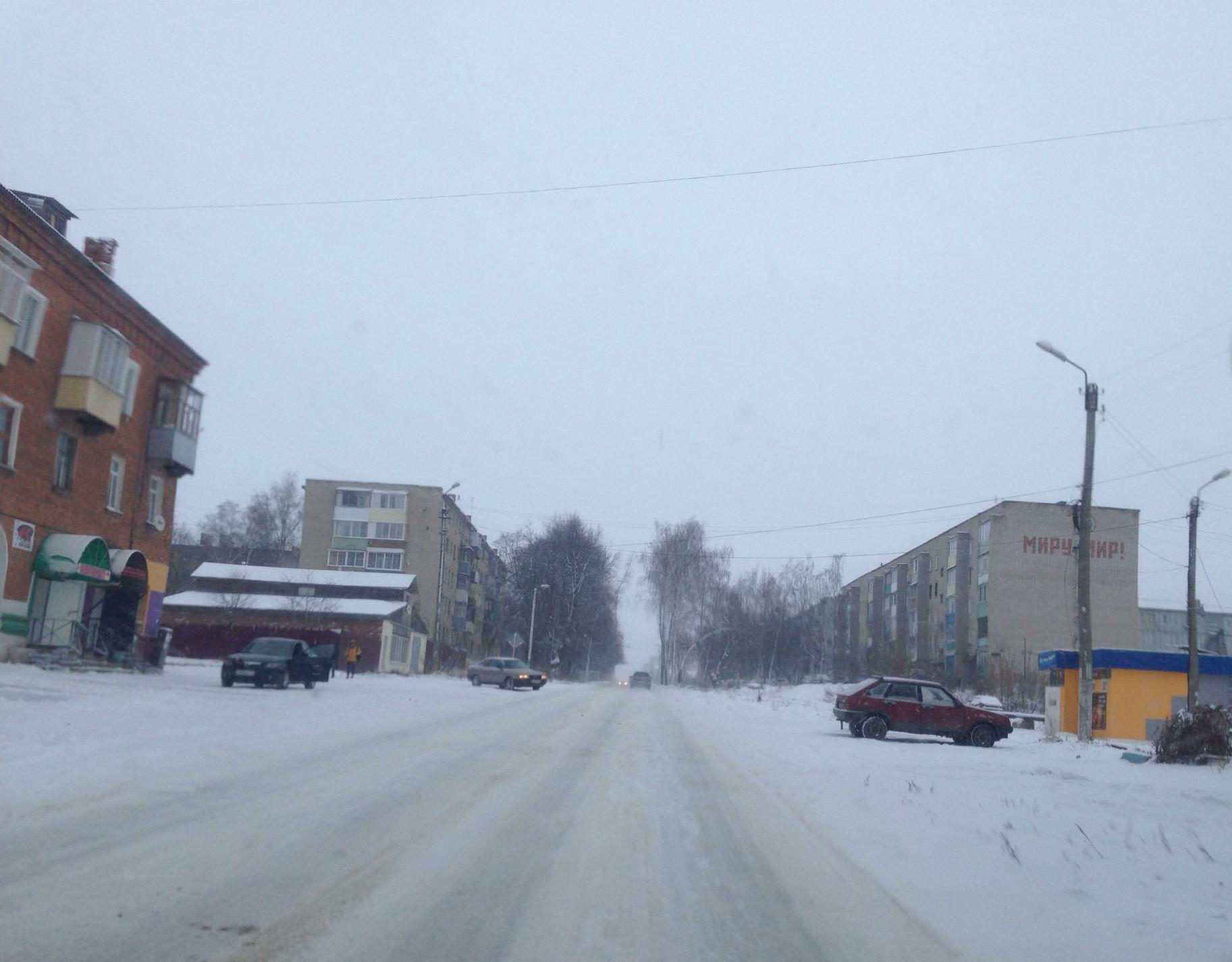 Bolokhovo